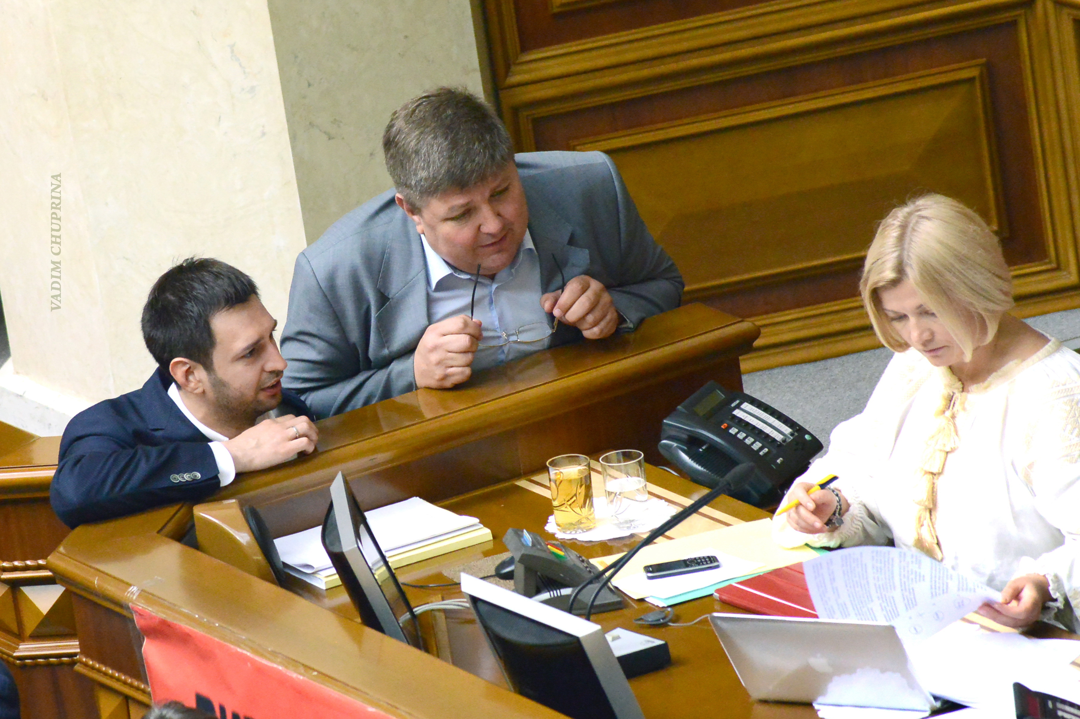 ВЕРХОВНА РАДА УКРАЇНИ 2016 , фото Вадим Чуприна